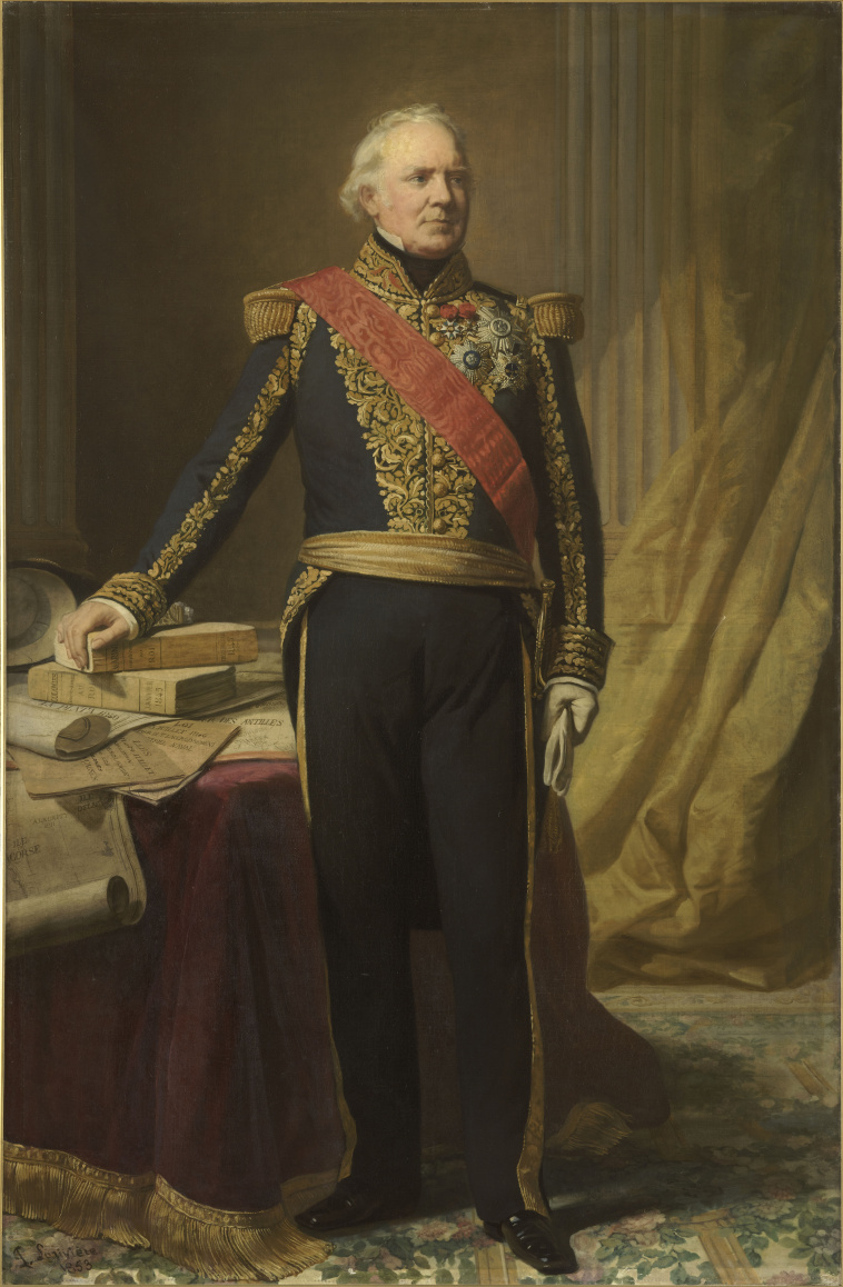 Amiral Ange-René-Armand de Mackau (1788-1855)